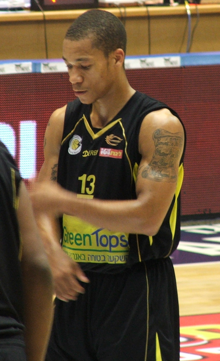 Maccabi Tel Aviv VS. Barak Netanya 31/10/11